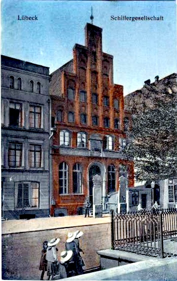 nachcolourierte Aufnahme